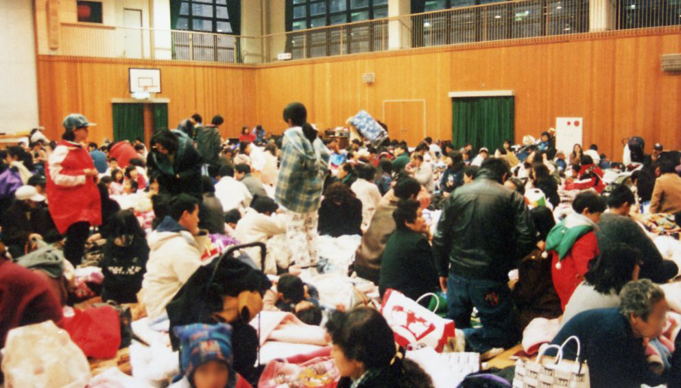 阪神淡路大震災により避難所になった学校体育館の内部。